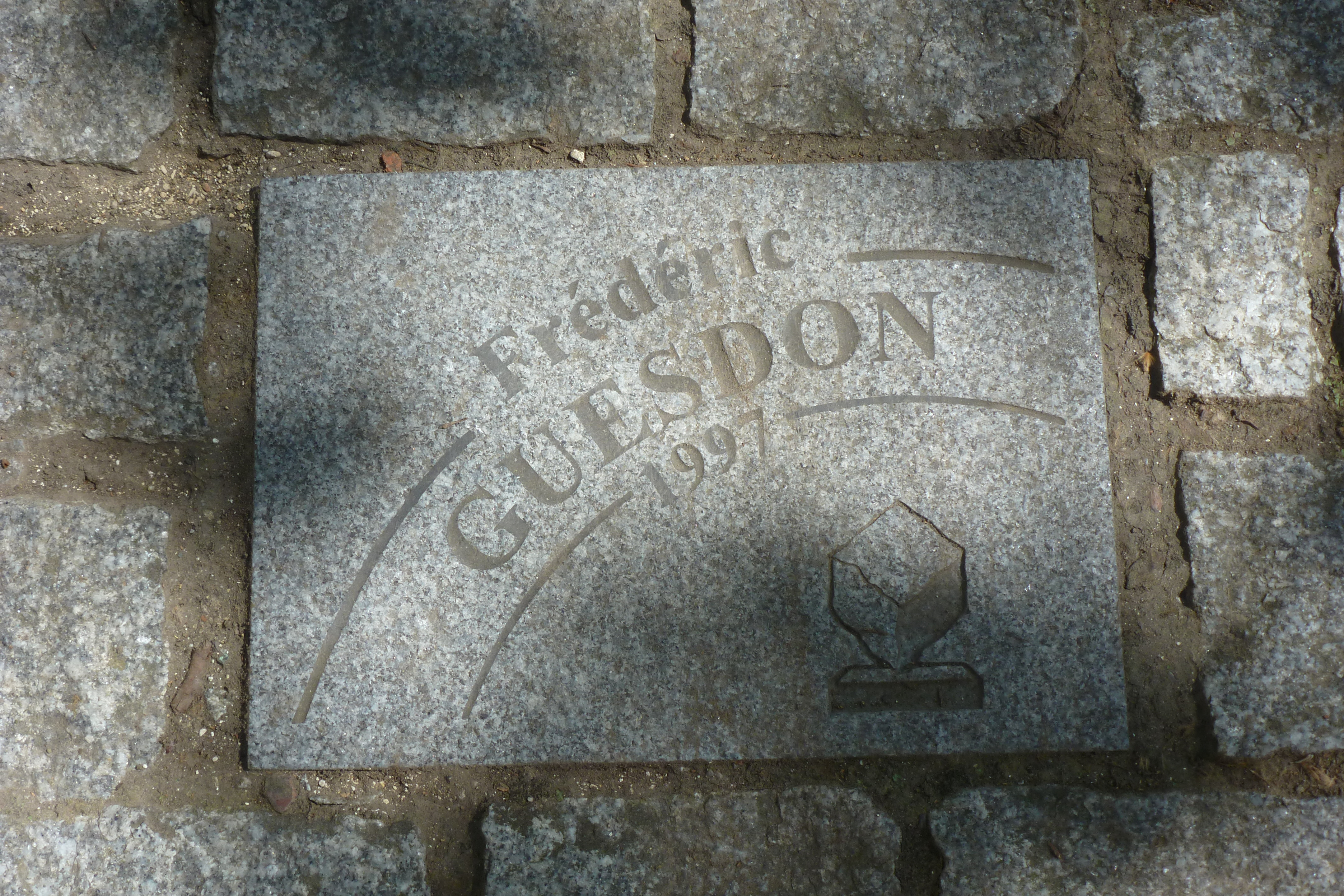 Pflasterstein für Frédéric Guesdon auf der Allée Charles Crupelandt in Roubaix